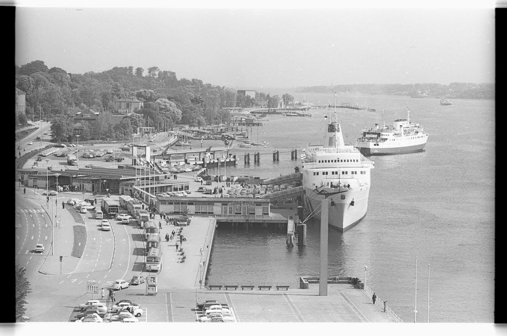 Blick vom Sell-Speicher. Im Hintergrund die Kiellinie.